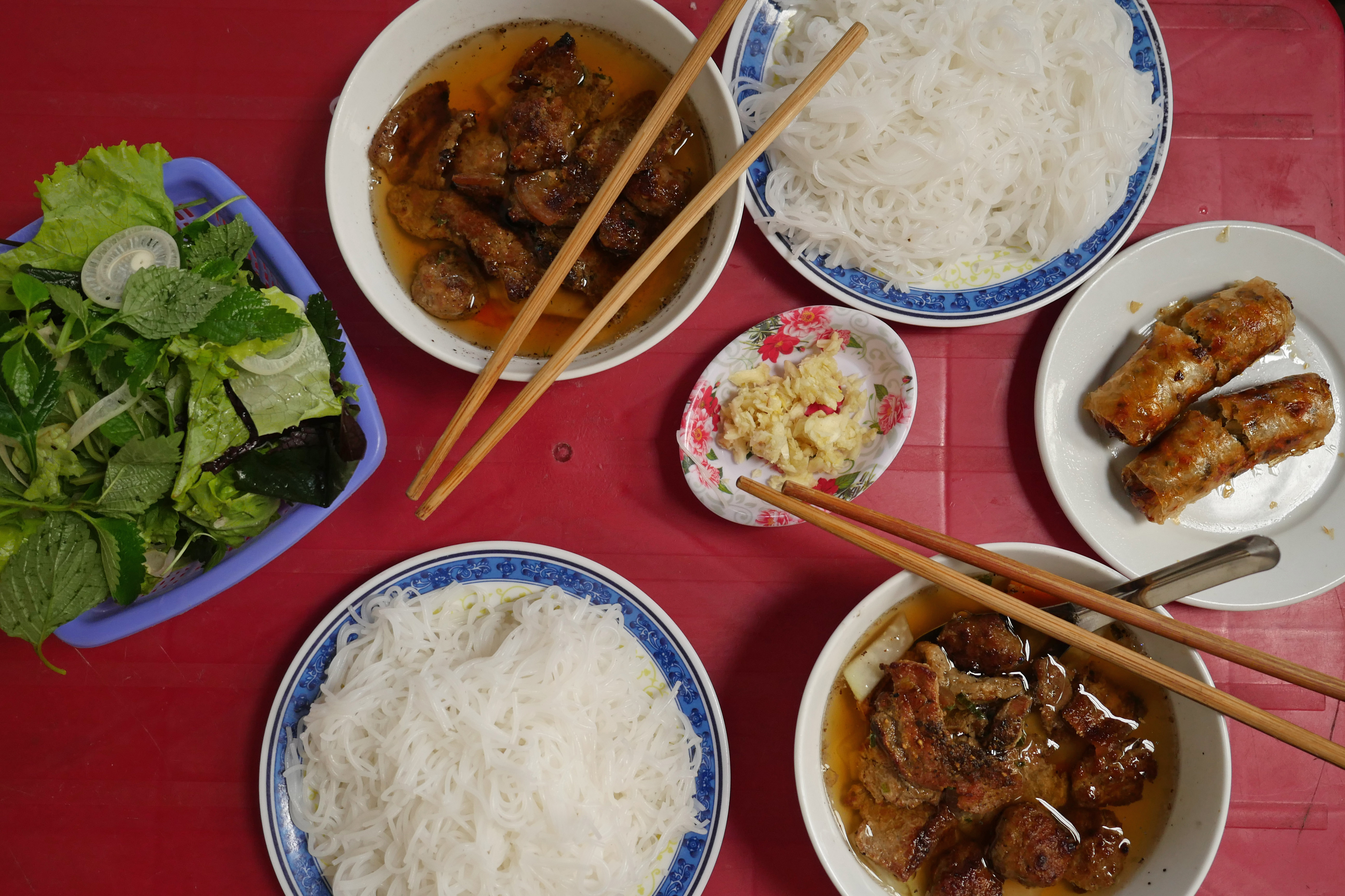 Un plat de bún chả à Hanoï